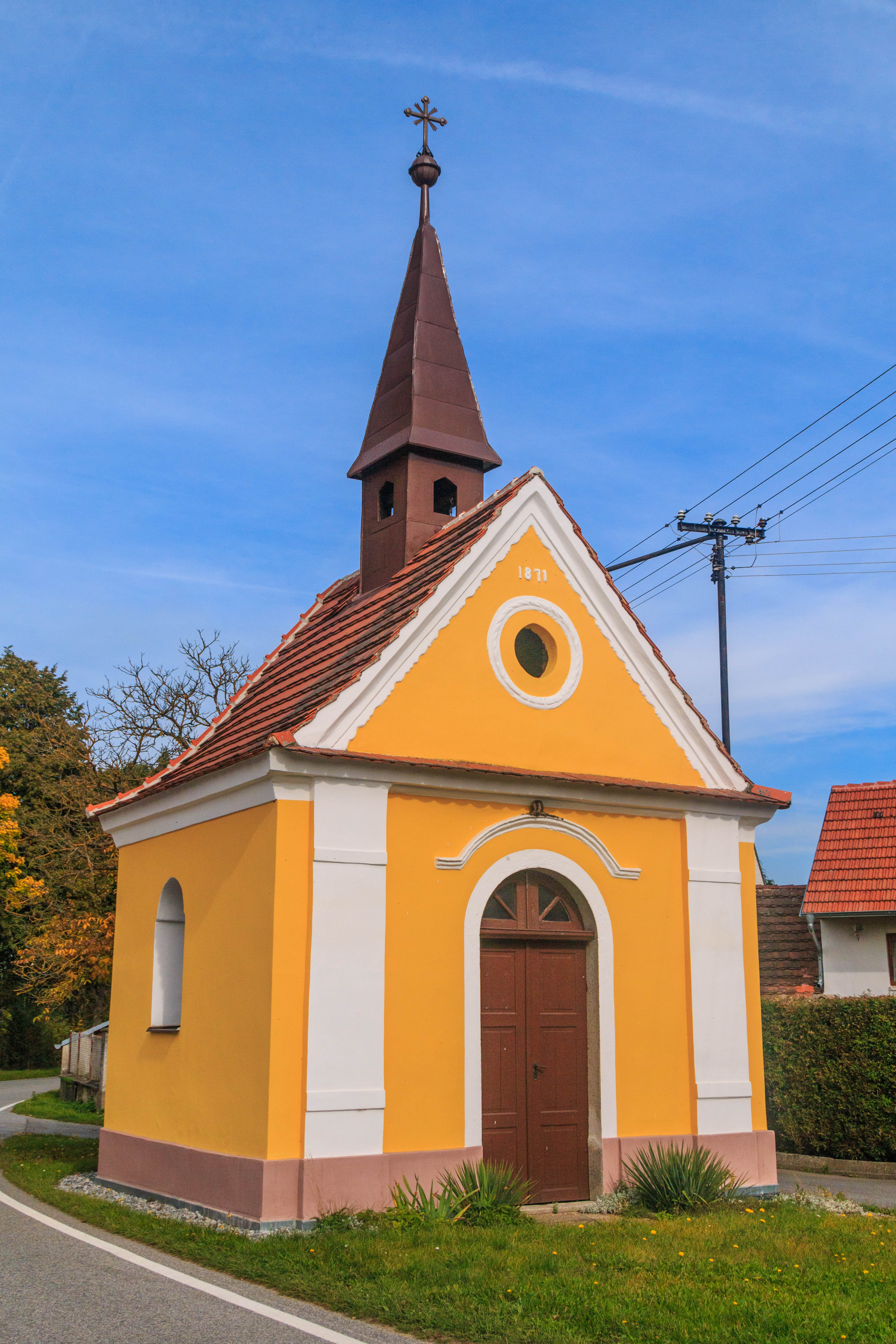 Nahošín - kaple